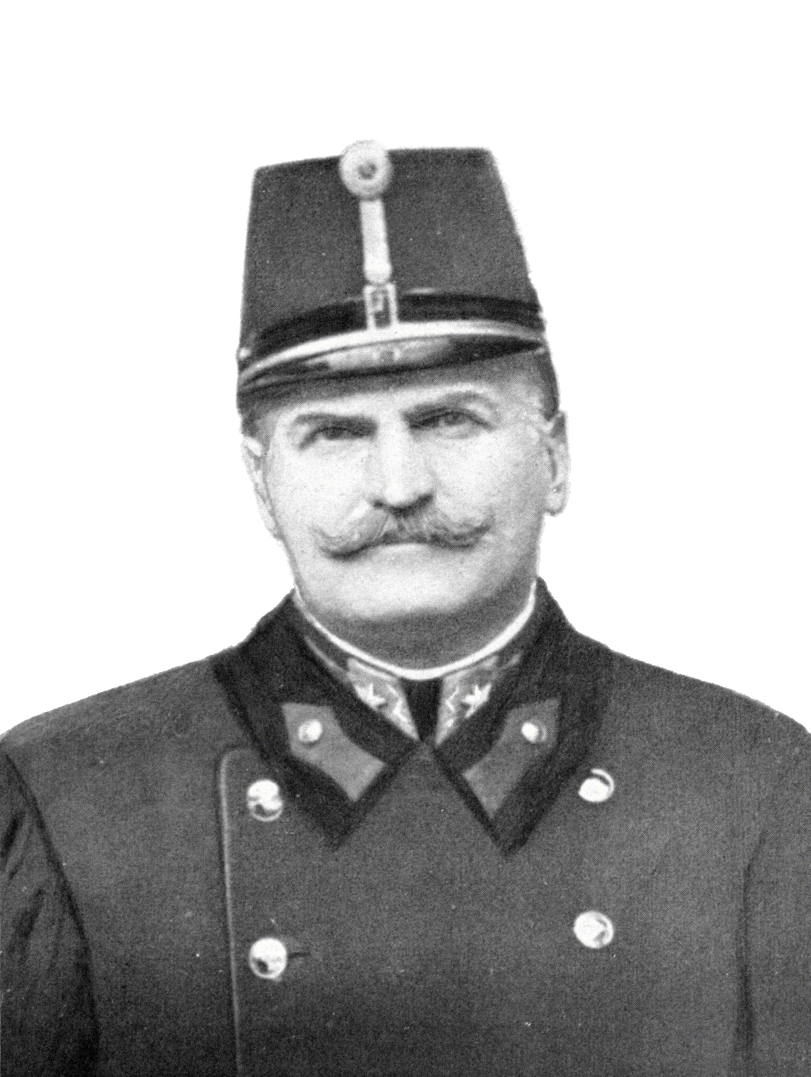 Franz Ritter Höfer von Feldsturm (1861-1918), Austrian-Hungarian general